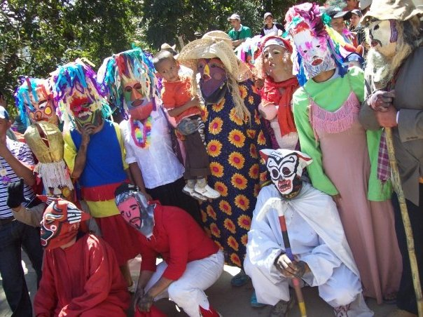 Foto por mi en la poblacion de Carache, edo. Trujillo.